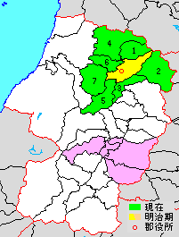 Map of Mogami District, Yamagata, Japan